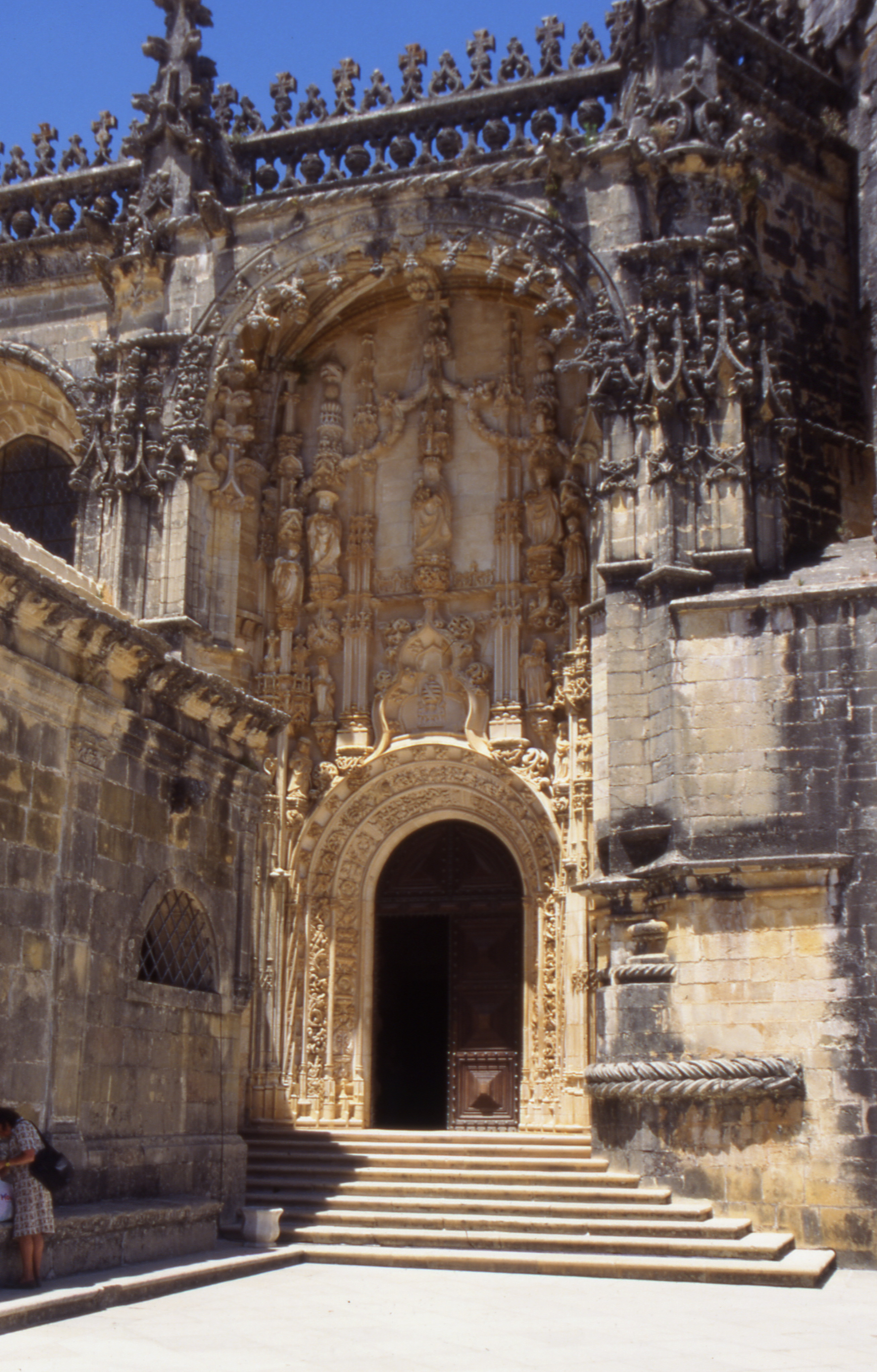 Tomar / Convento de Cristo / Eingang